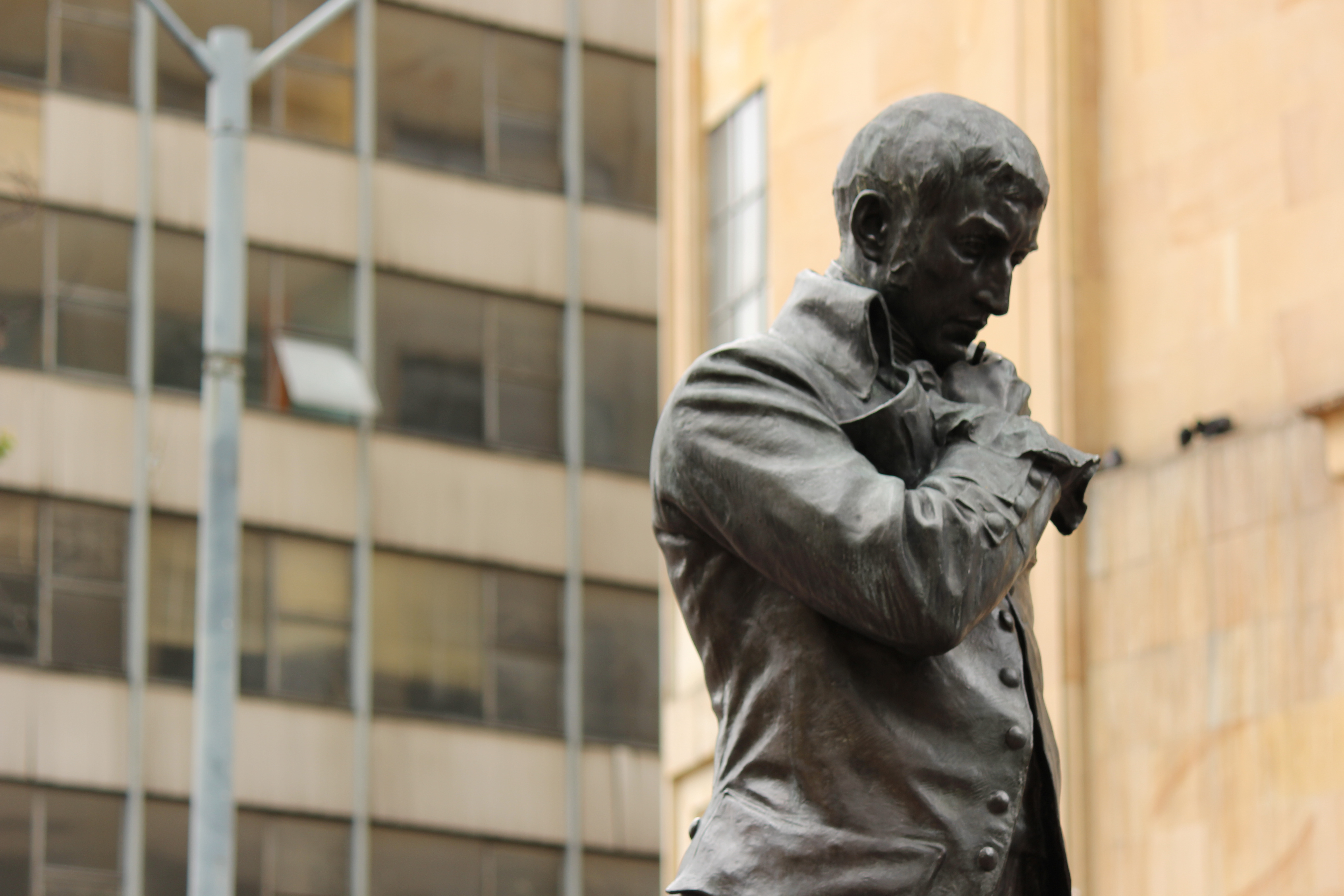 Plaza de Caldas en la carrera 7ma con 20.